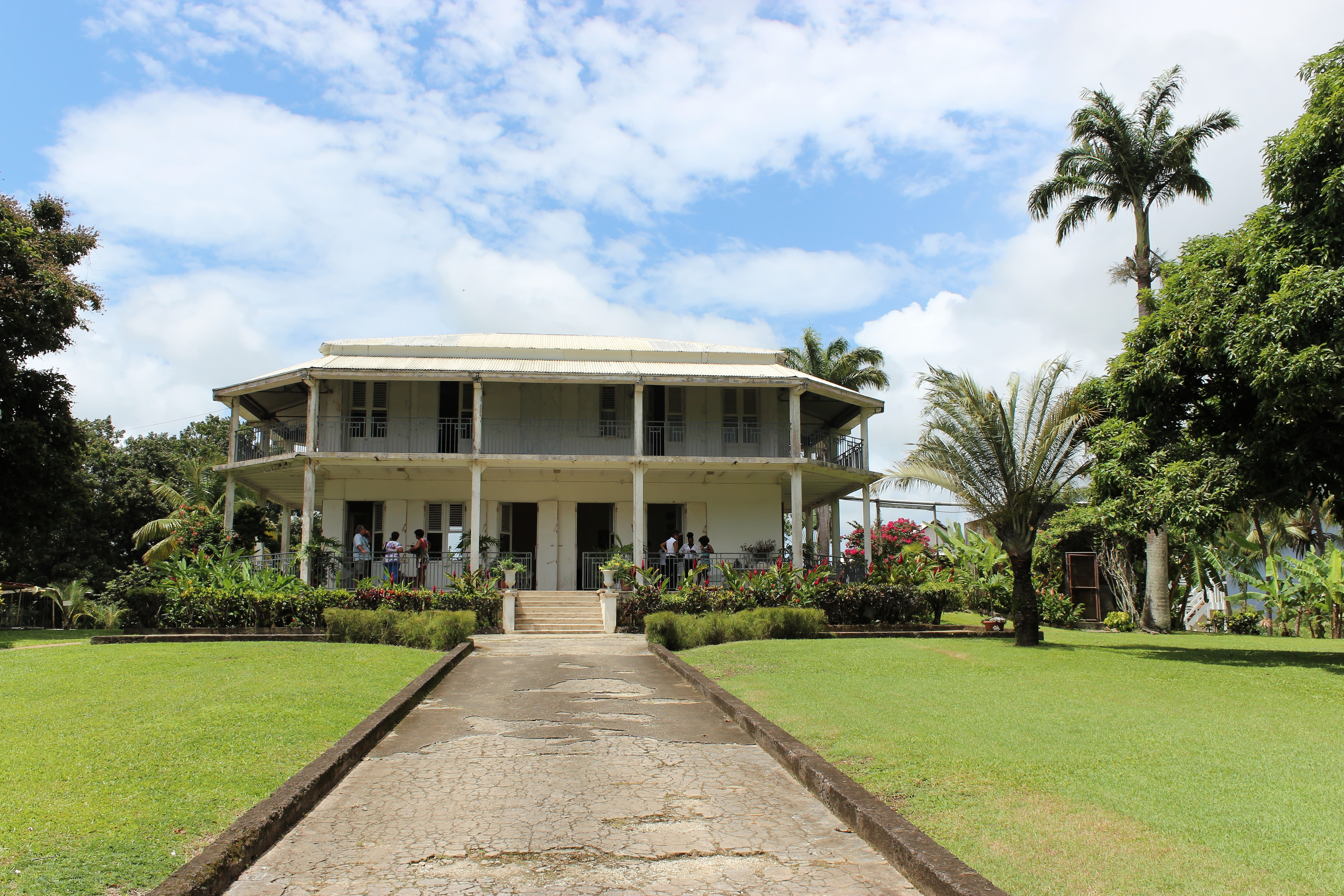 Habitation Routa, Lamentin, Guadeloupe